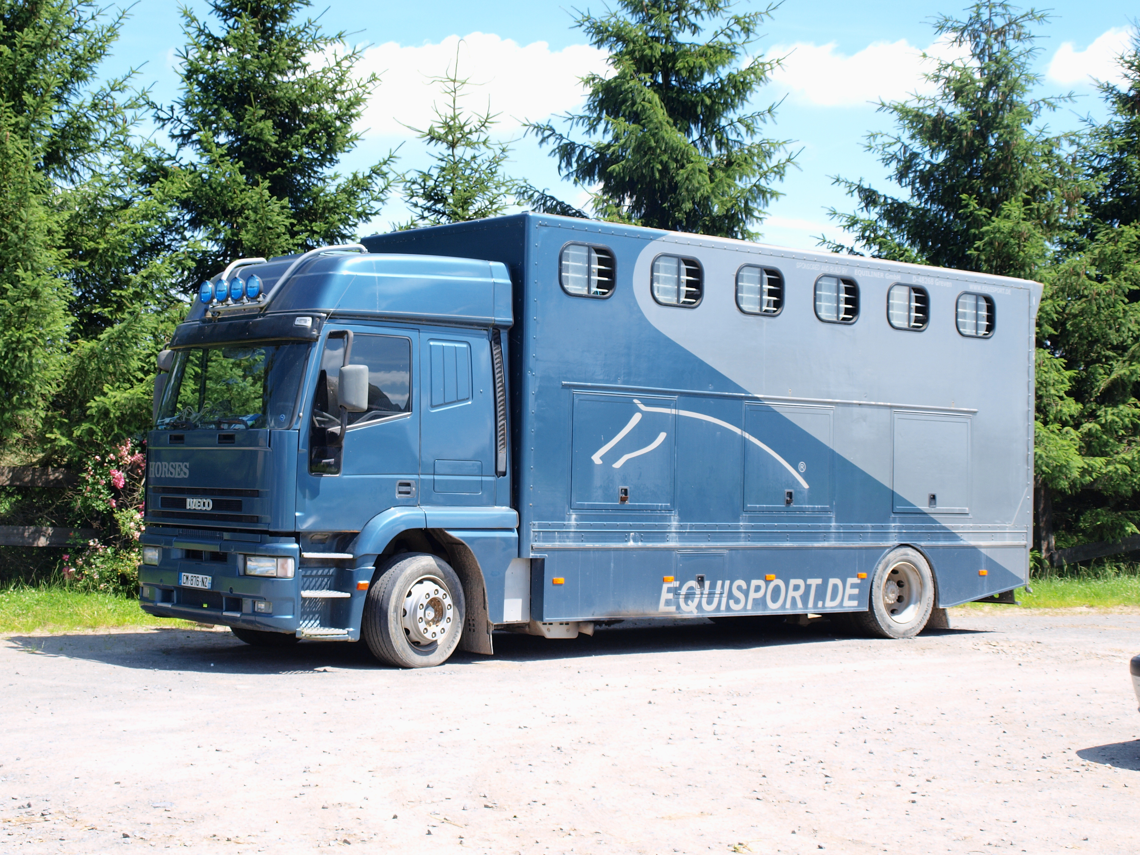 Cense de Remicourt à Rethel (Ardennes, France)